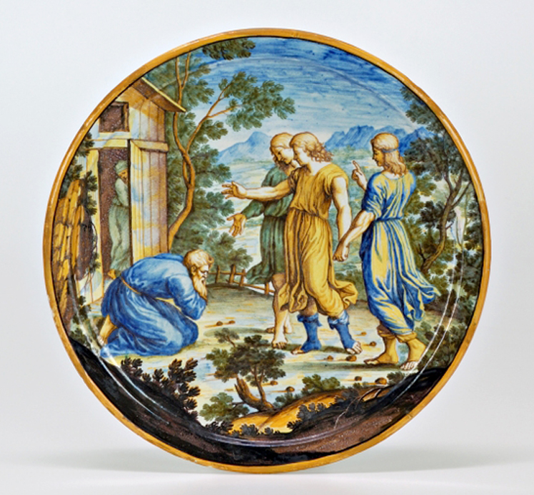 Piatto in maiolica dipinto con Abramo e i tre angeli. Ferdinando Maria Campani, San Quirico d'Orcia. Metà del XVIII secolo.